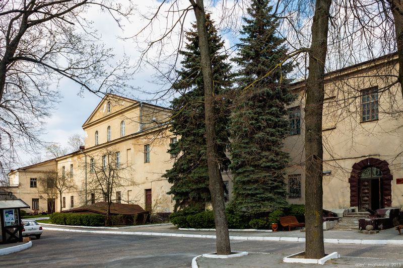 Гродна. Рэстаўрацыя Старога замка